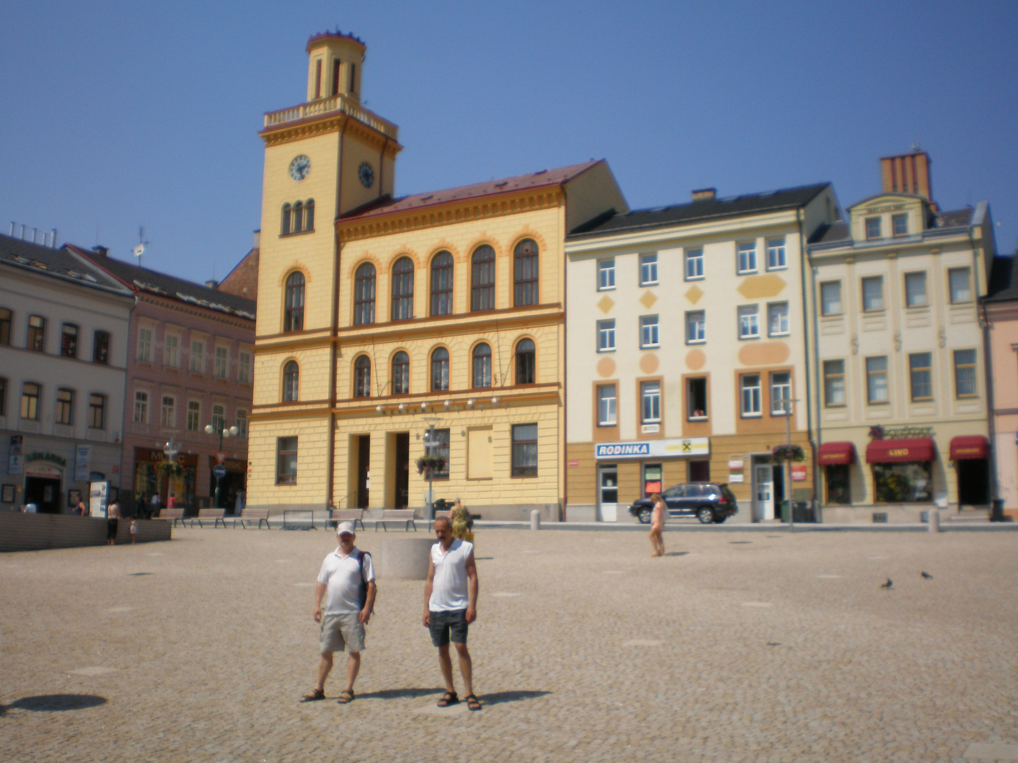 Stará radnice v Jablonci nad Nisou